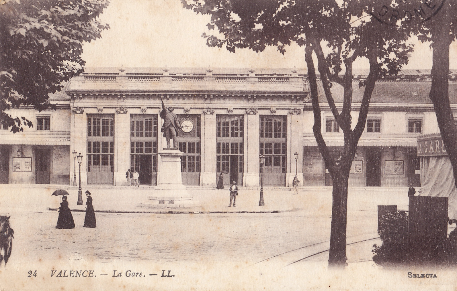 Carte postale ancienne éditée par LL, n°24 : VALENCE - La Gare